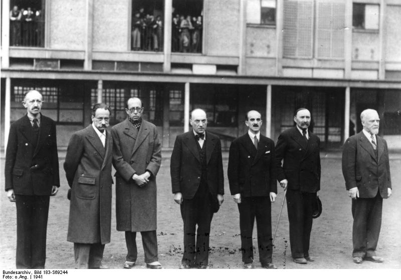 Scherl: Im Konzentrationslager von Drancy (Frankreich) 1941. Einige jüdische Advokaten, die zur Zeit im Lager interniert sind. UBz von links nach rechts: Weill, Valensi, Azoulay, Ulmo, Cremieux, Eduard Bloch und Pierre Mas ADN-Zentralbild-Archiv II. Weltkrieg 1939 45 Nach der Besetzung Frankreichs durch die faschistische deutsche Wehrmacht werden auch hier die nazistischen Rassengesetze angewendet. Im Judenkonzentrationslager von Drancy (Frankreich) 1941. Einige jüdische Advokaten, die zur Zeit im Lager interniert sind. UBz von links nach rechts: Weill, Valensi, Azoulay, Ulmo, Cremieux, Eduard Bloch und Pierre Mas.